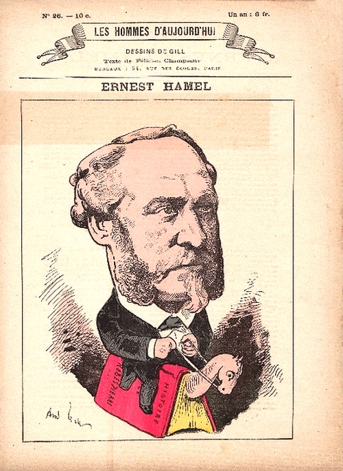 Ernest Hamel par André Gill, Les Hommes d'aujourd'hui n°26, 1879